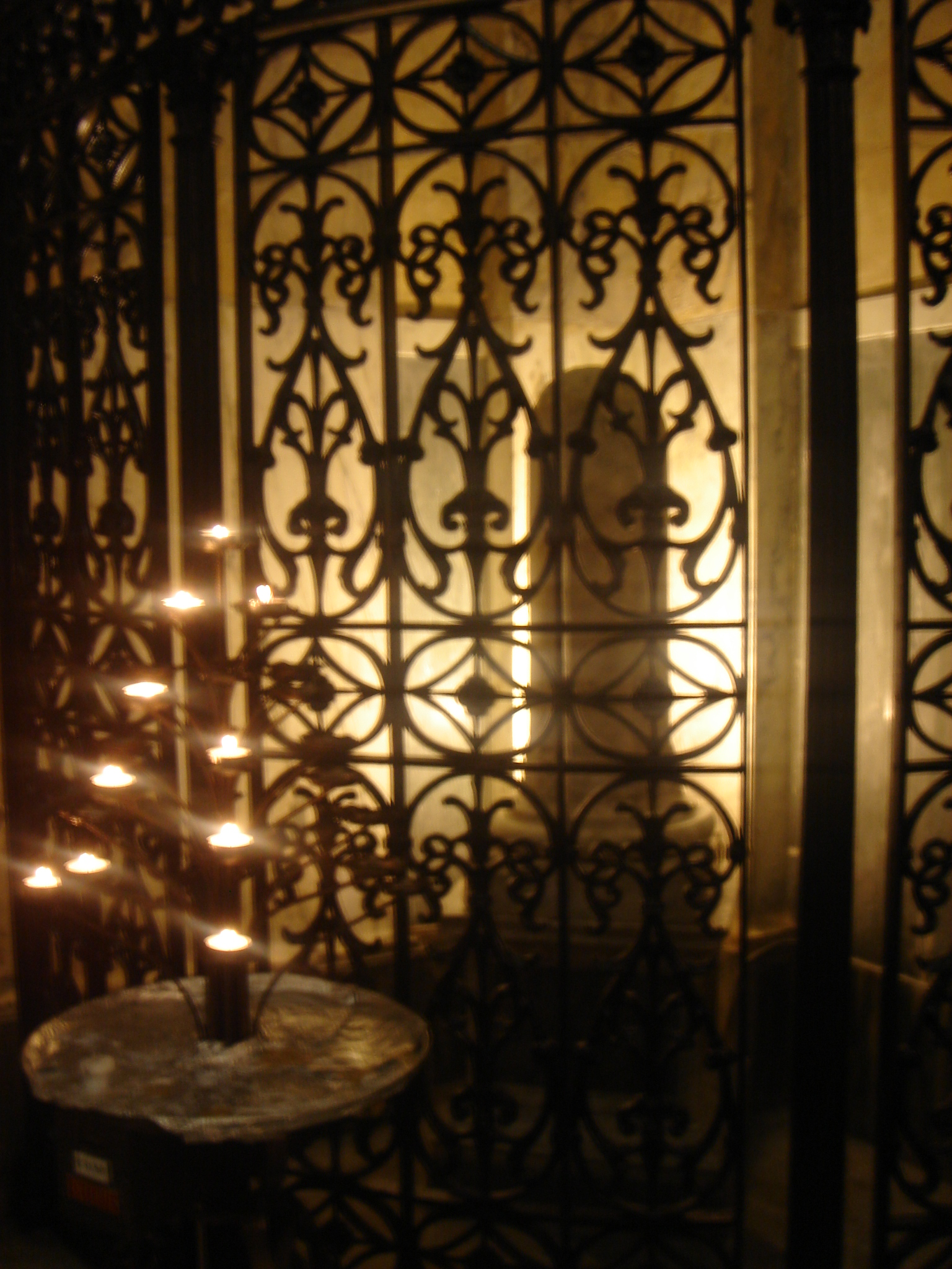 Roma, Abbazia delle Tre Fontane: chiesa di san Paolo, colonna del martirio di san Paolo